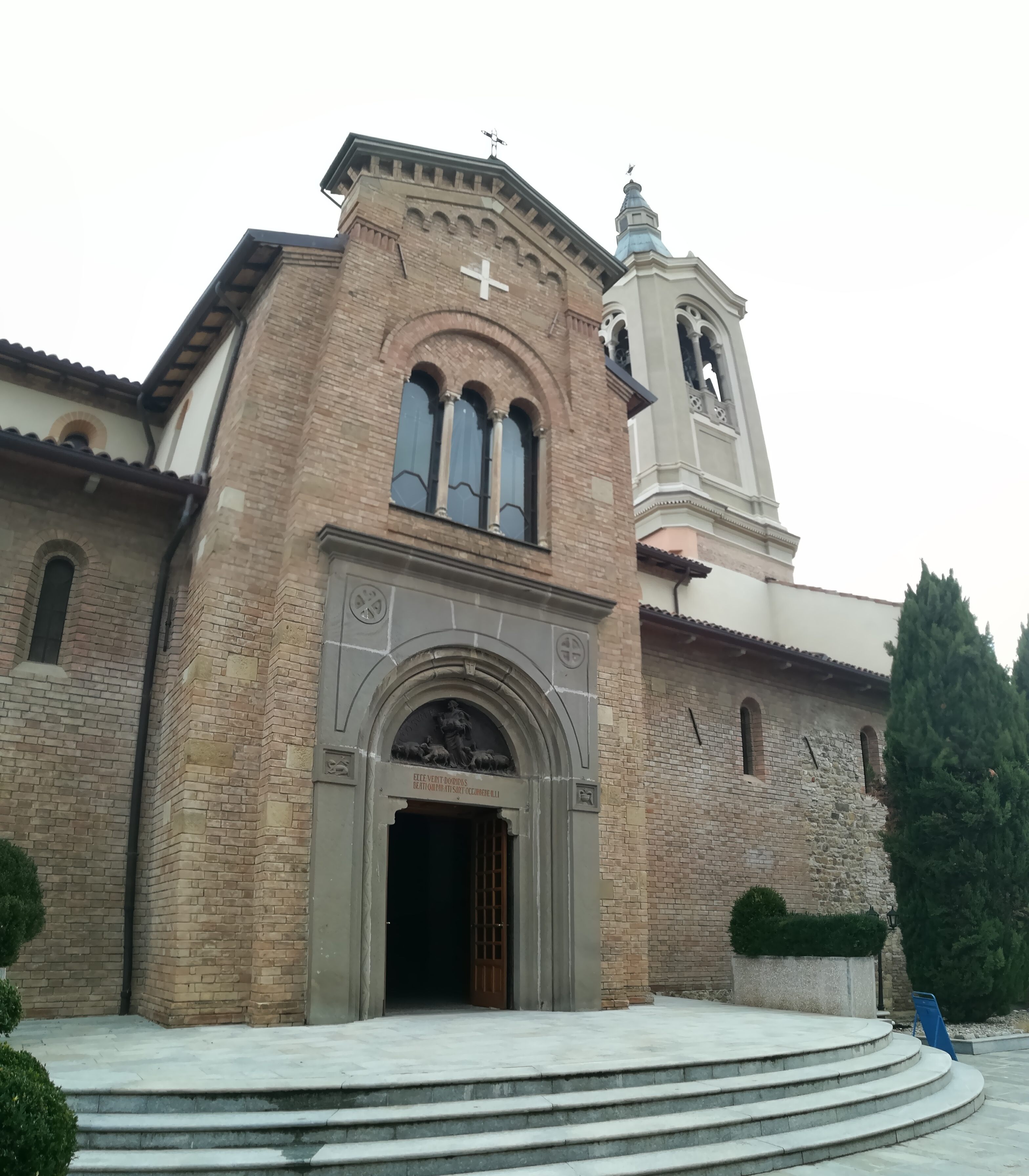 Traversetolo